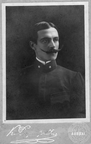 Атанасиос Сулиотис